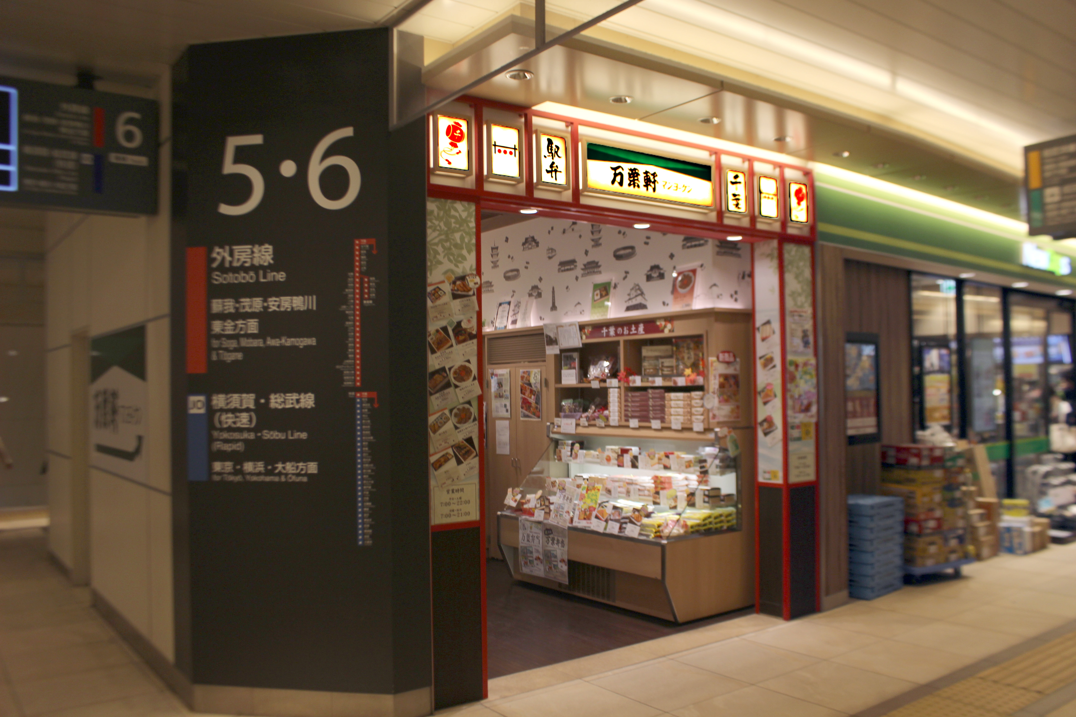 JR千葉駅改札内店舗 駅弁屋 万葉軒